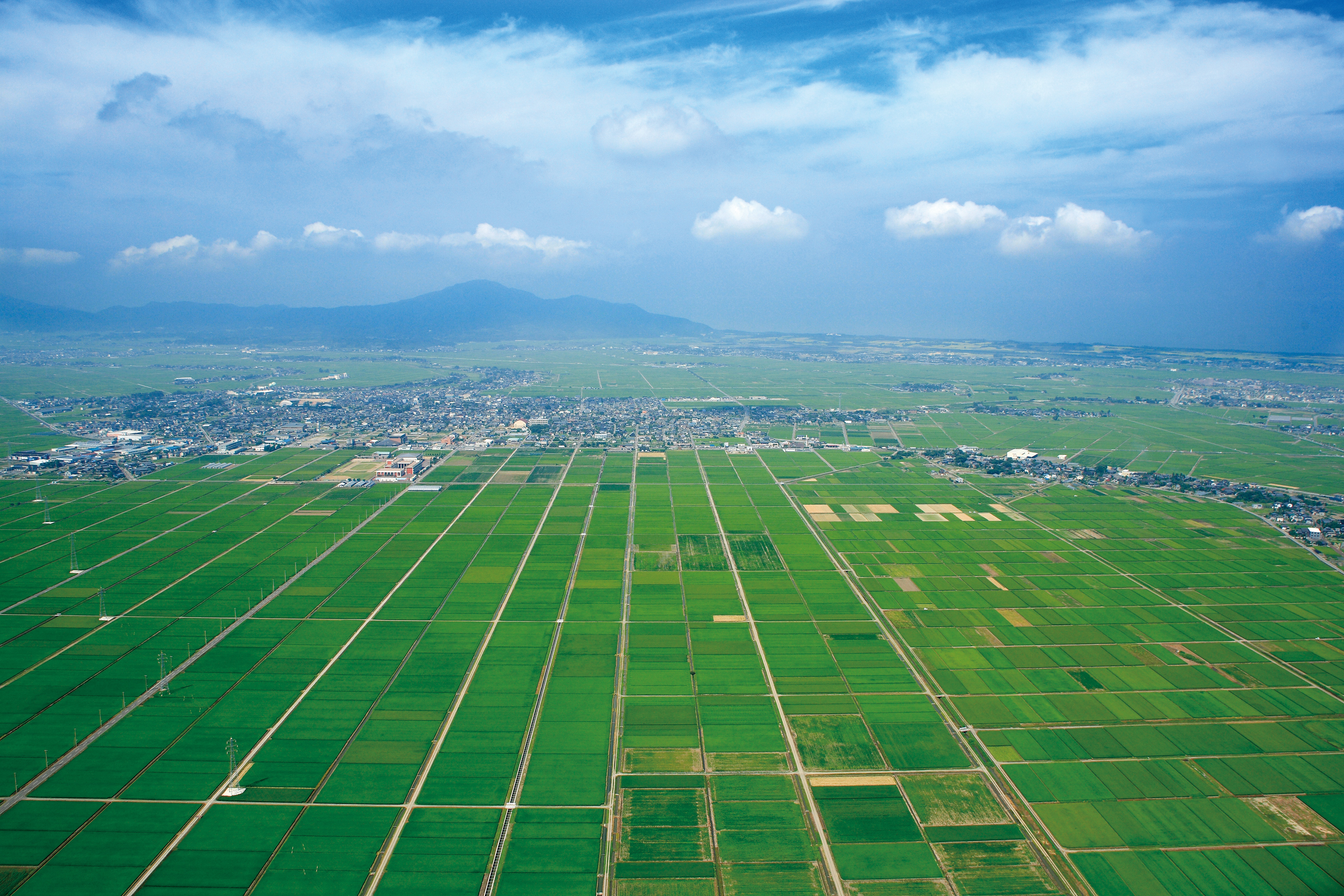 越後平野 新潟市 2006年撮影